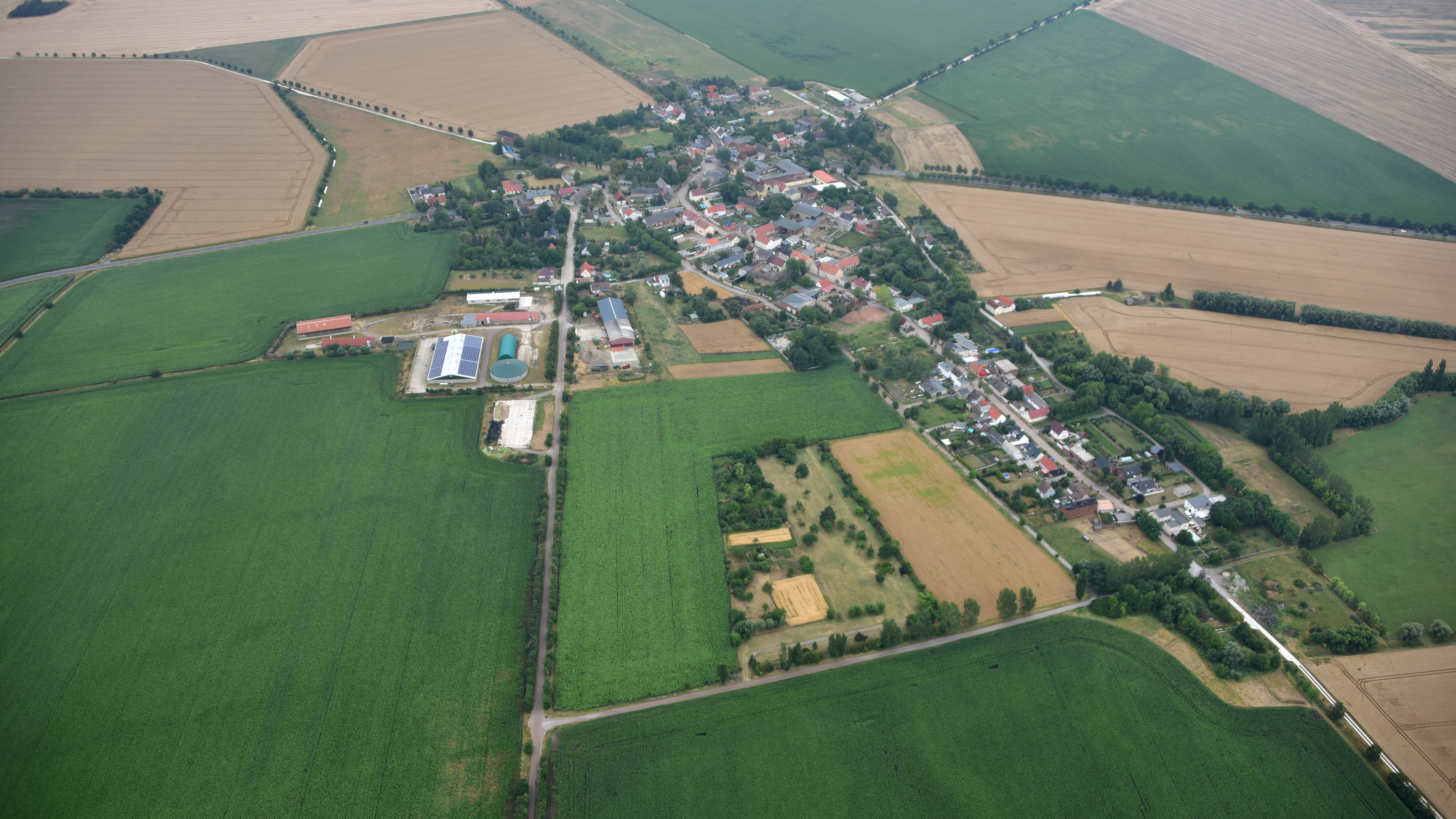 Zuchau, Luftaufnahme (2019)